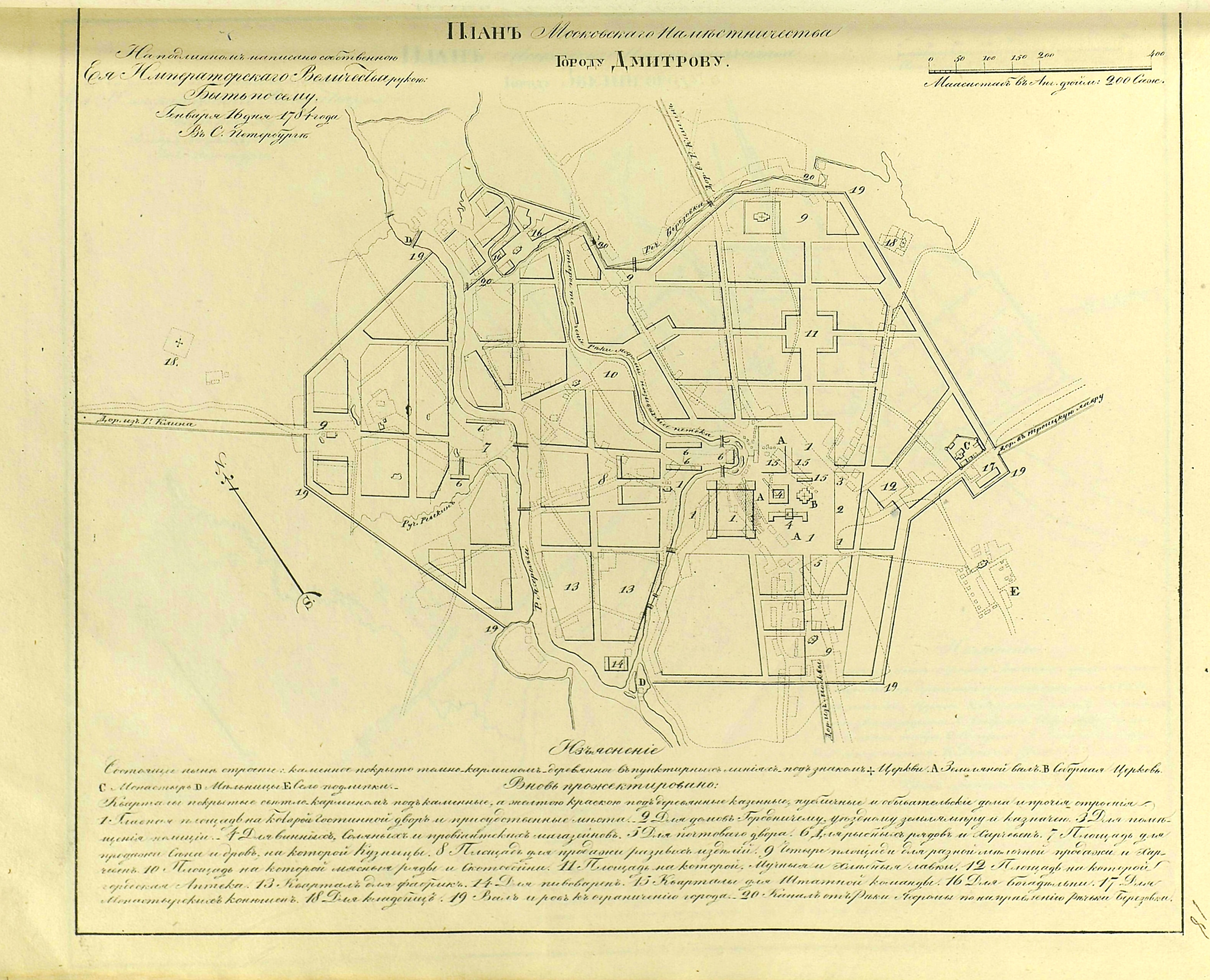 "Прожектированный" план города Дмитрова 1784 года из "Полного собрания законов Российской Империи. Книга чертежей и рисунков. Планы городов."